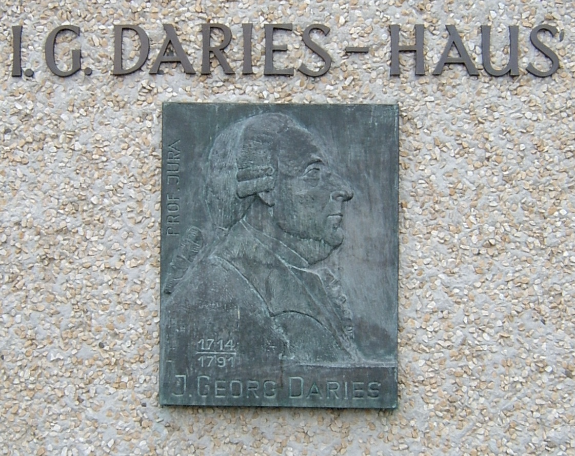 Schild am Wohnhaus in Frankfurt (Oder) im Studentendorf Mühlenweg. Dargestellt ist Georg Daries (1714-1791)